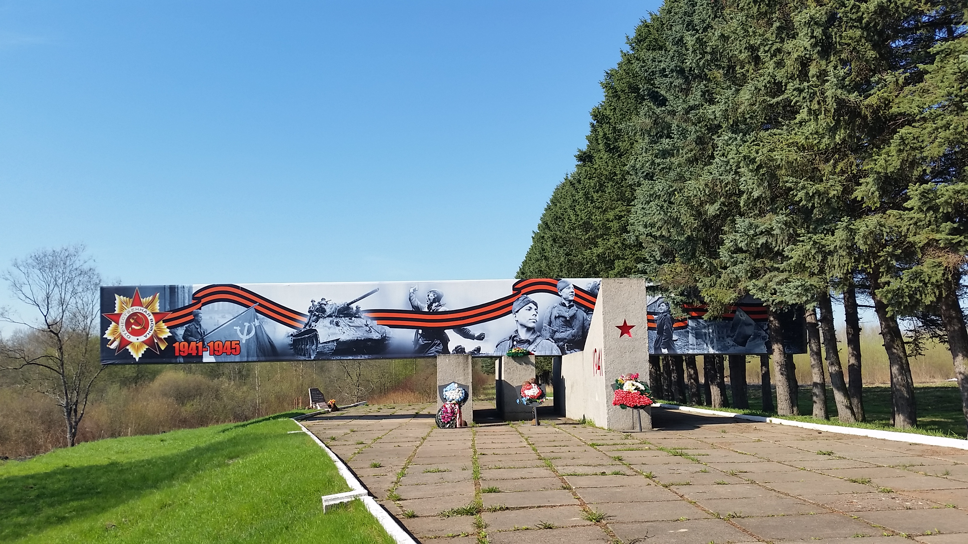 мемориал в городе Отрадное Ленинградской области